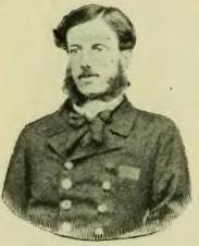 Antônio Carlos de Mariz e Barros